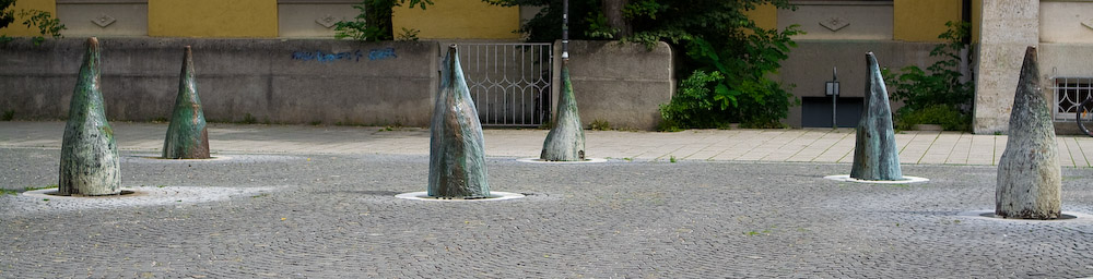 Märchenbrunnen in München Schwabing am Ernst Toller Platz